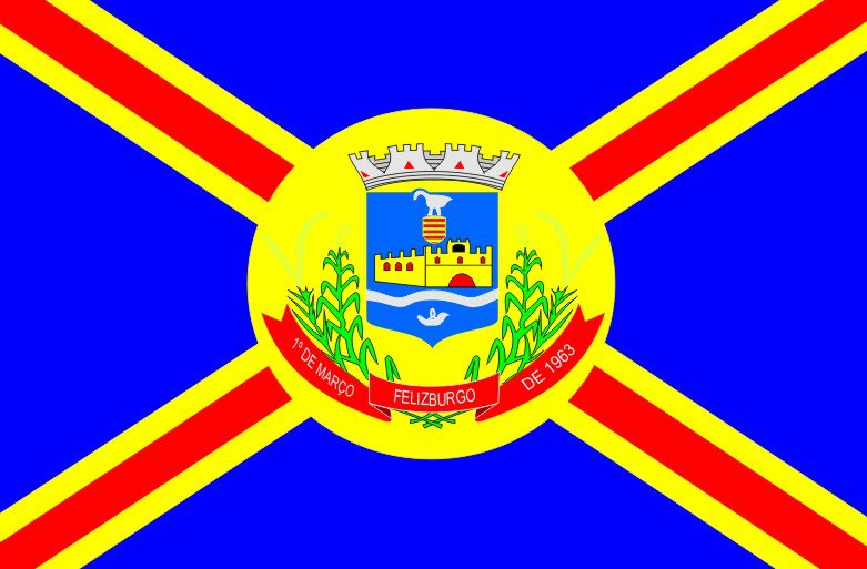 Bandeira de Felisburgo